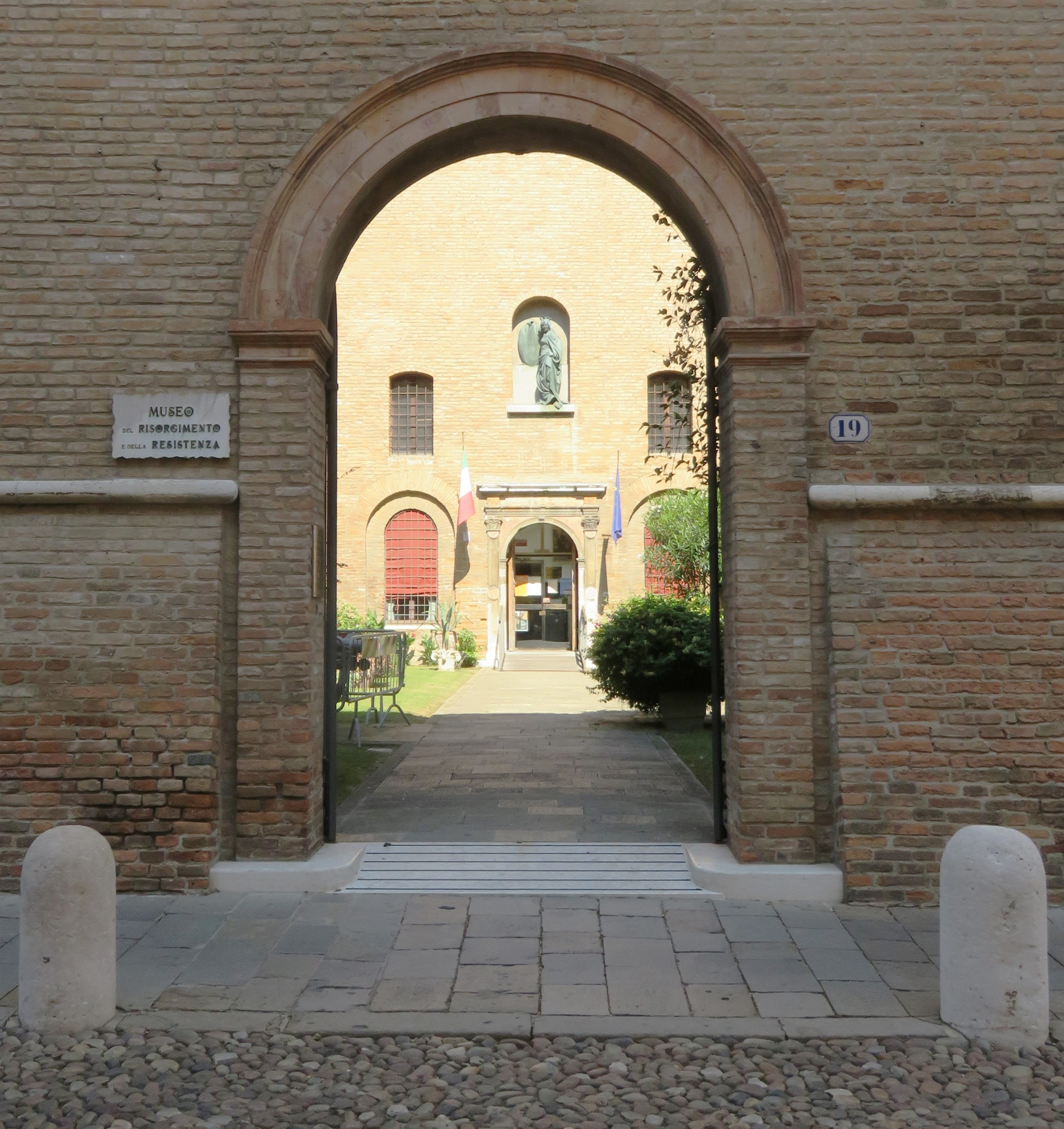 Accesso in Ercole I d'Este del museo, con vista del cortile esterno